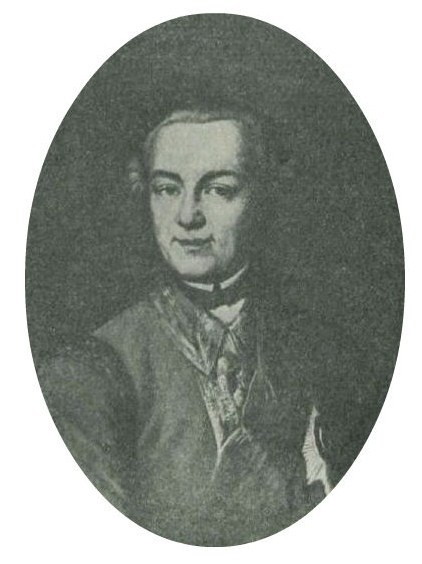 Александр Никитич Вильбоа (1716—1781). Данное изображение было использовано в статье «Вильбоа, Александр Никитич» опубликованной в шестом томе «Военной энциклопедии», который был издан книгоиздательским товариществом Ивана Дмитриевича Сытина в 1912 году в столице Российской империи городе Санкт-Петербурге.